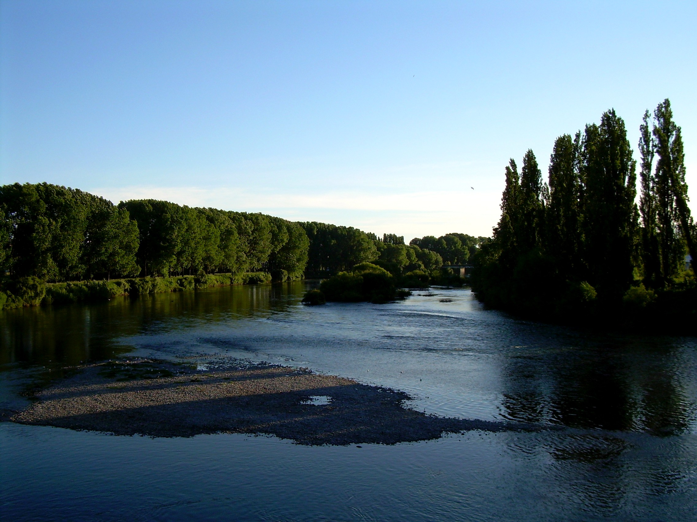 Rio Rahue